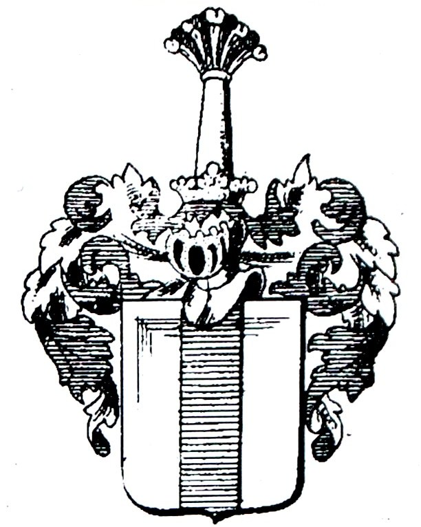 Familienwappen der Familie von der Horst (1786)